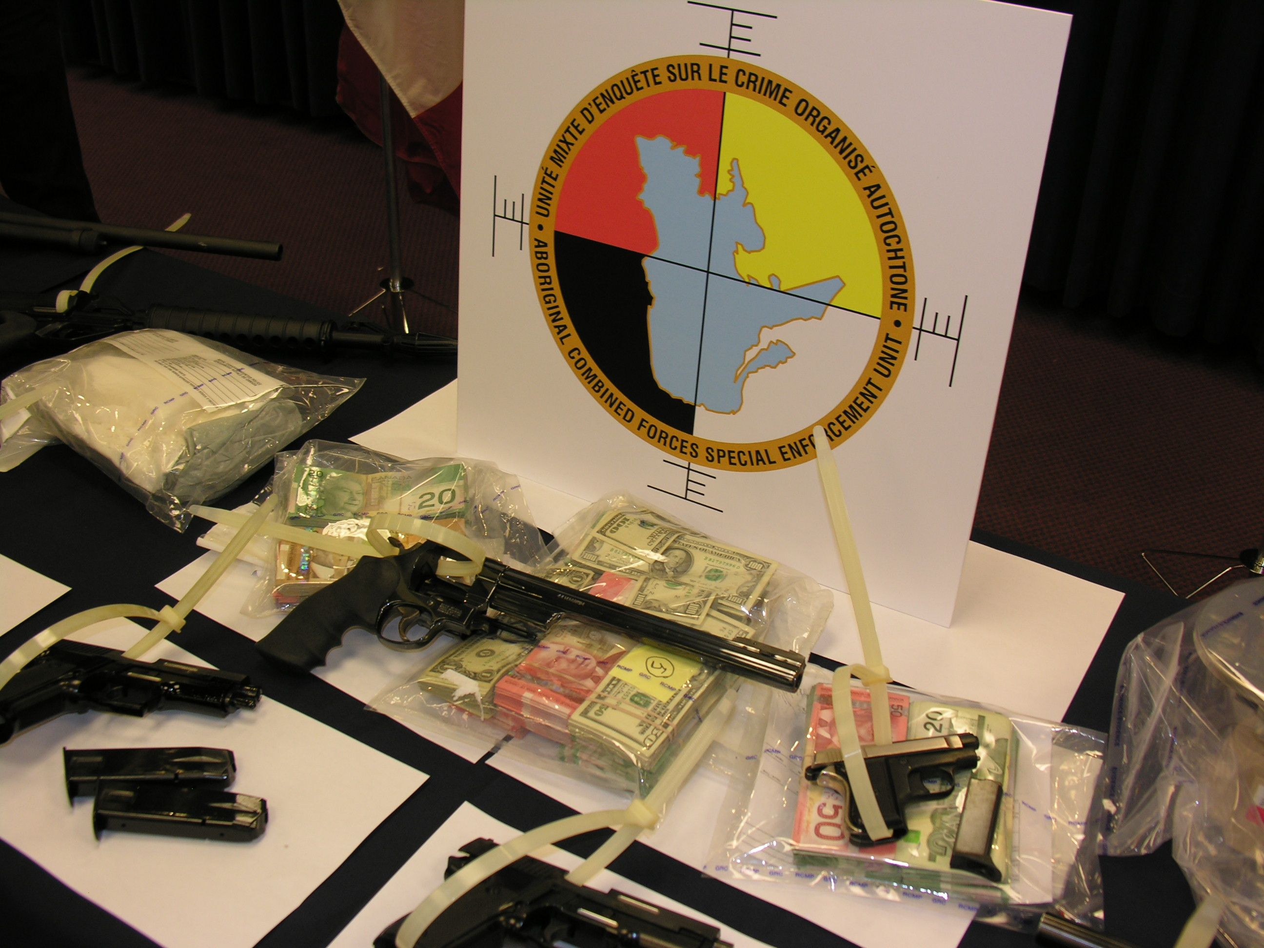 saisie